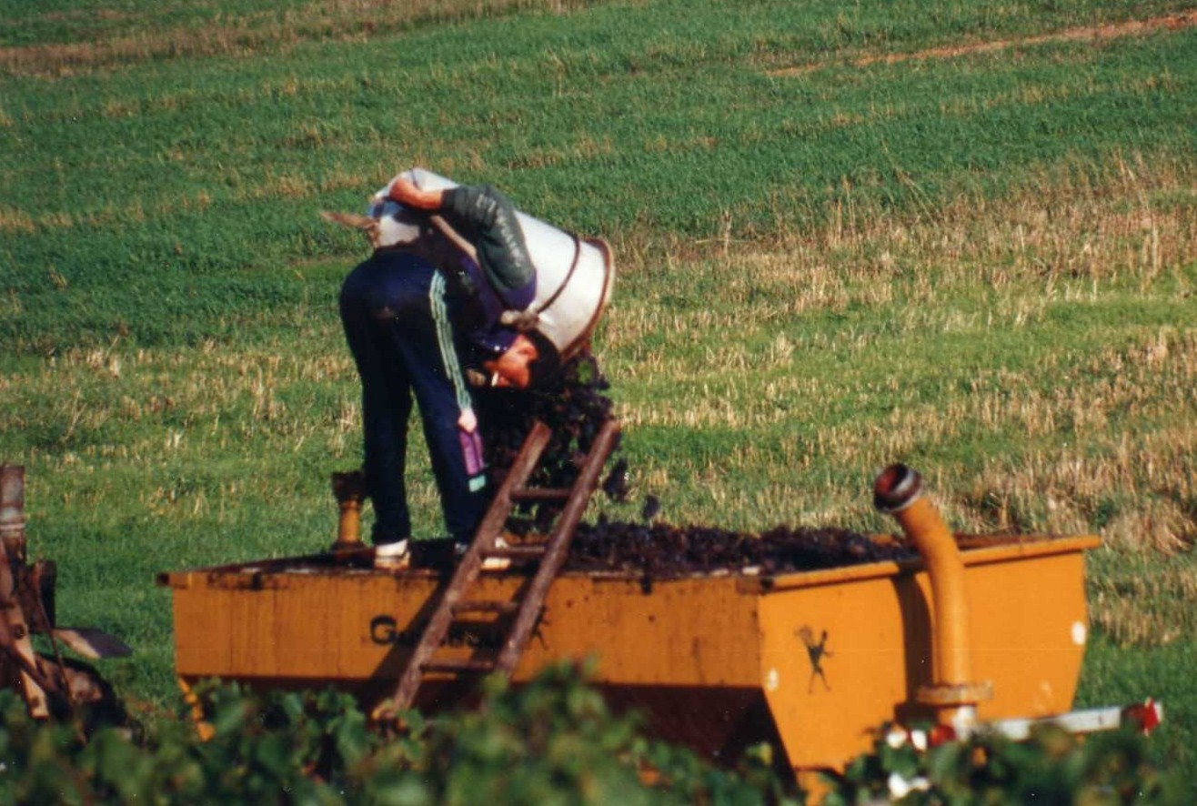 Buttenträger entleert seine Butt in den Traubenwagen